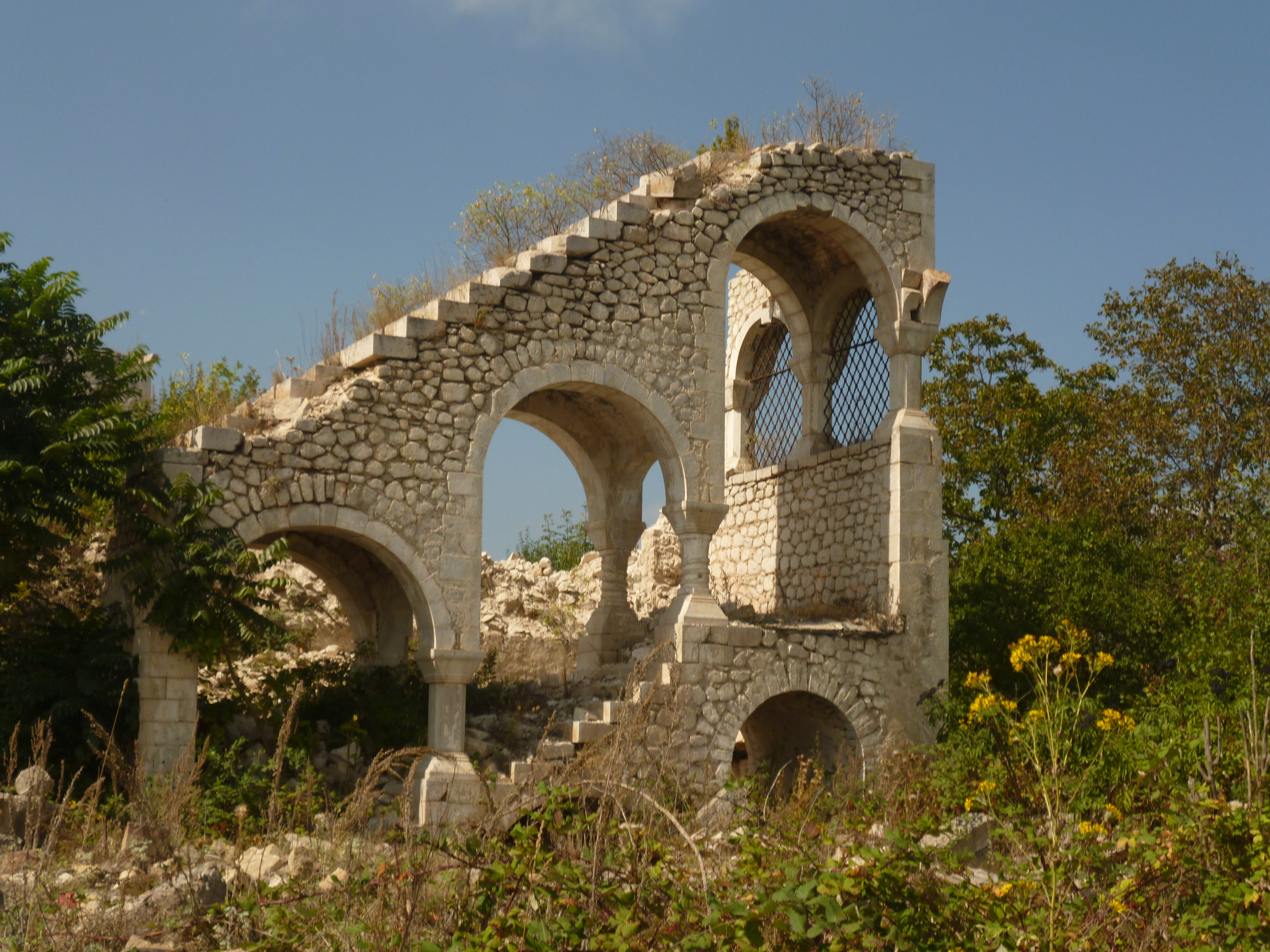 Şuşa şəhərində Xan sarayı. XVIII əsr. A.Qaraşərov küçəsi, 68